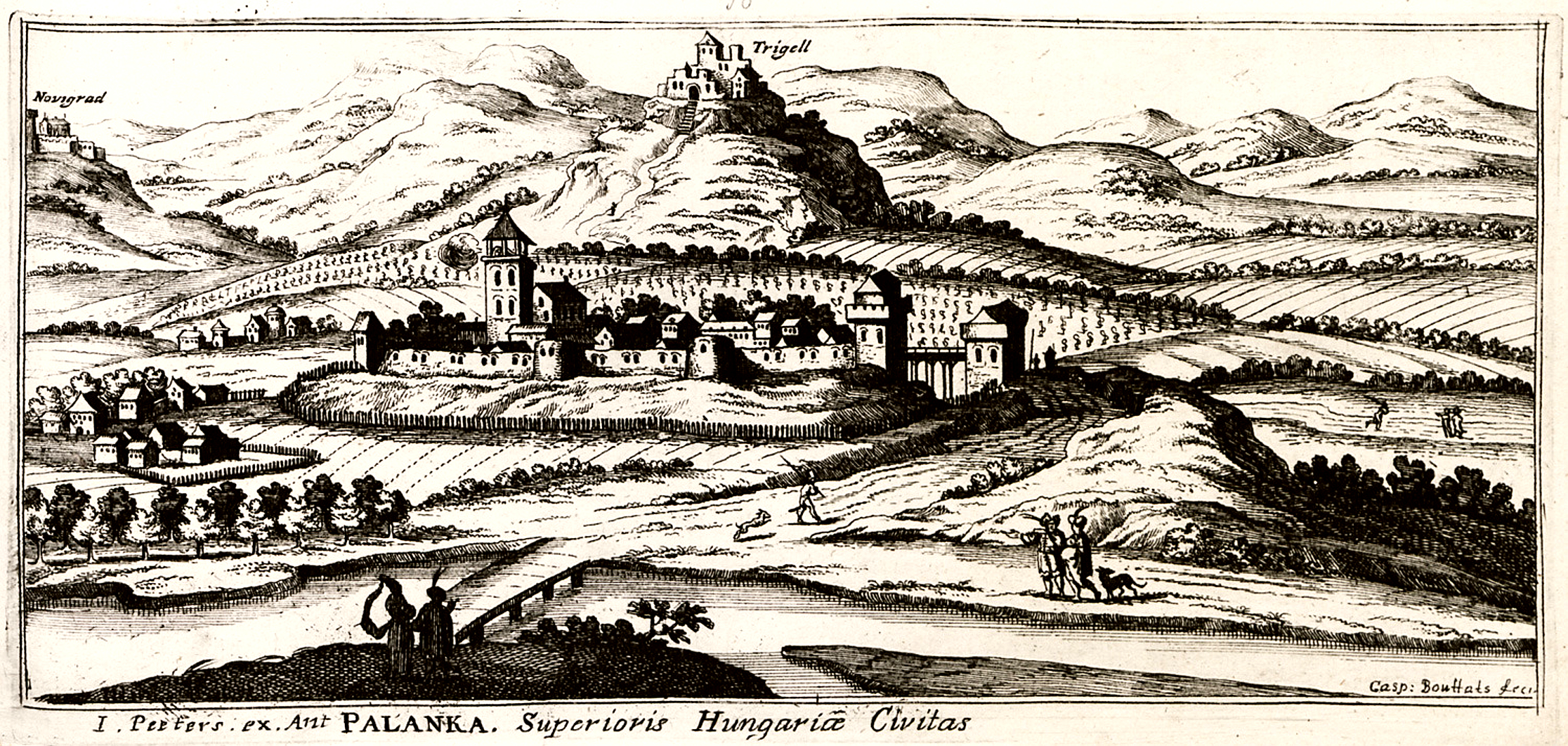 Old lithograph(?) of Drégely Castle (Trigell) and Drégelypalánk, Nógrád in Hungary